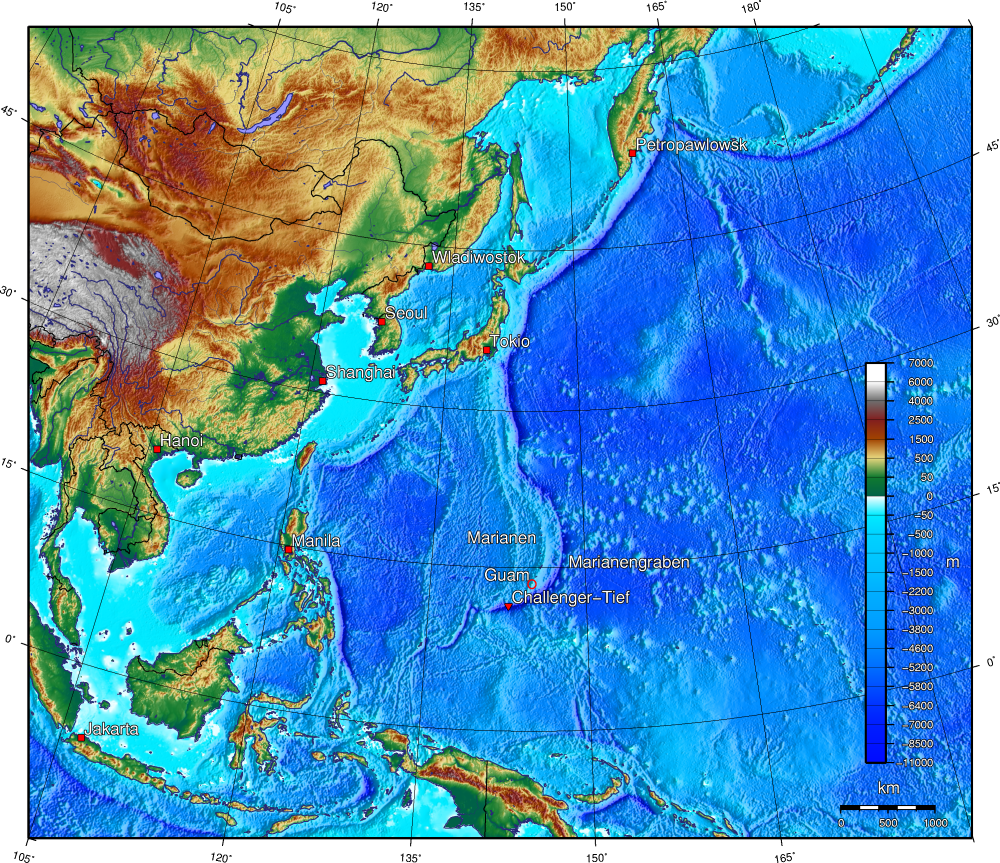 Karte des Marianengrabens. Bei der Erstellung der Landkarte wurden die Generic Mapping Tools verwendet: Für das Relief - falls vorhanden - wurde(n) einer oder mehrere dieser externen Public Domain -Datensätze verwendet: * ETOPO2 (Auflösung 2′ = 3,6km am Äquator) * GLOBE (30″ = 0,9km) * SRTM (Shuttle Radar Topography Mission) (3″ = 90m)